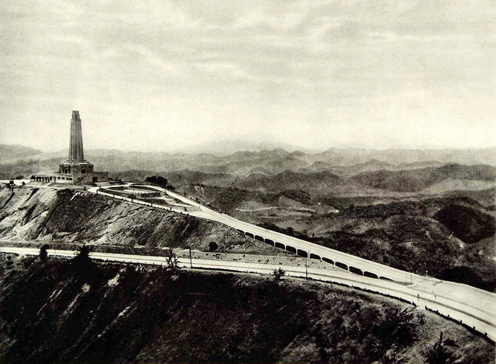 O Monumento Rodoviário em 1939